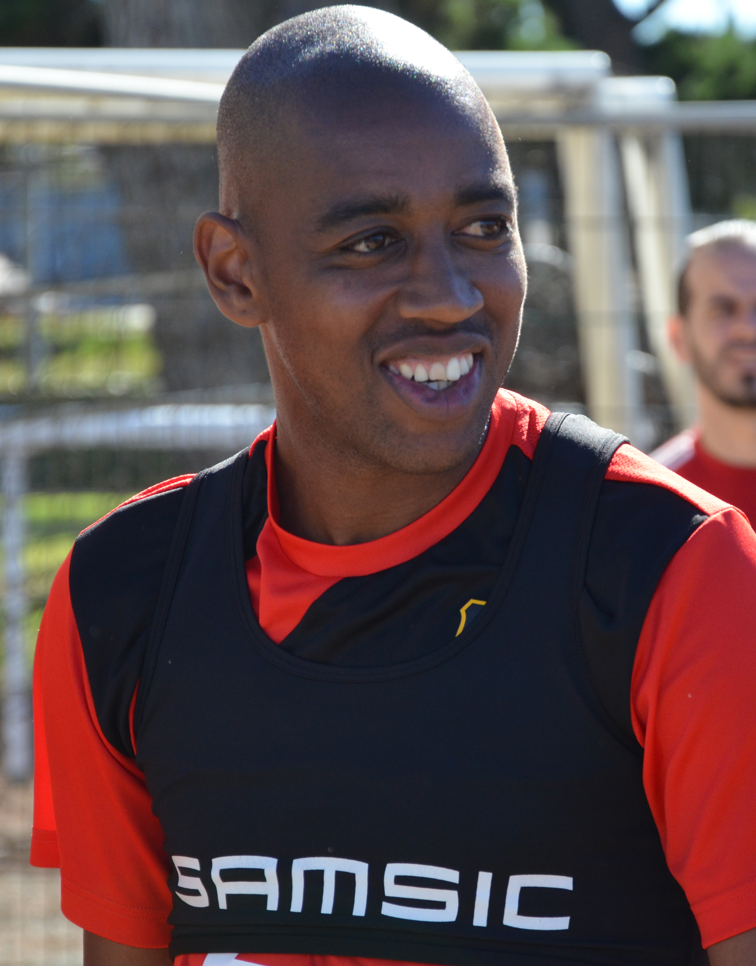 Photographie prise lors du match opposant le Stade rennais à l'USM Alger en match amical au stade Paul-Audrin de Dinard le 16 juillet 2016. Ici, Gelson Fernandes.